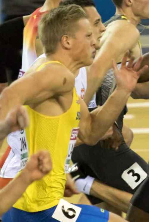 EKI20410 halve finale 60m man